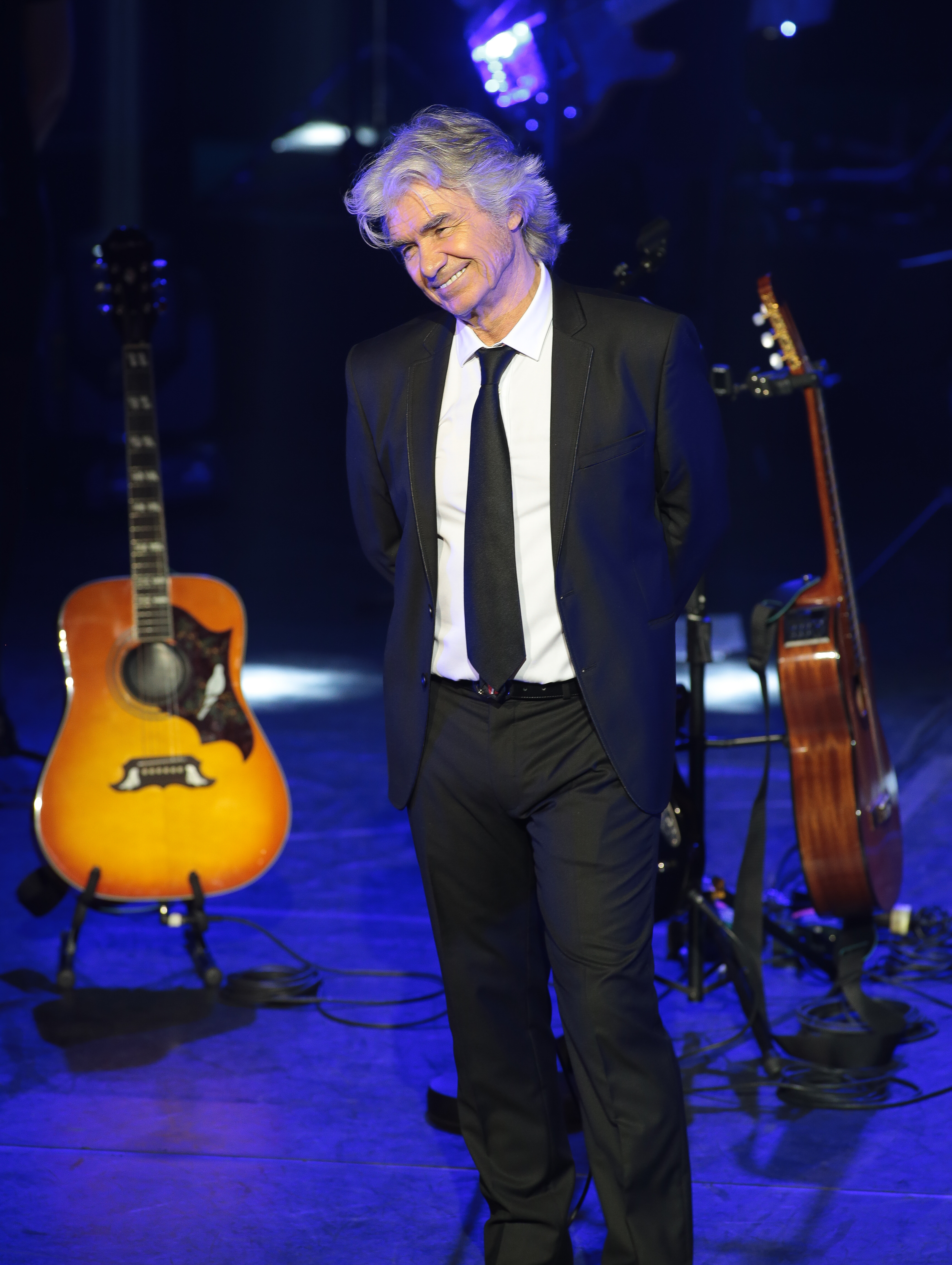 Daniel Guichard sur scène